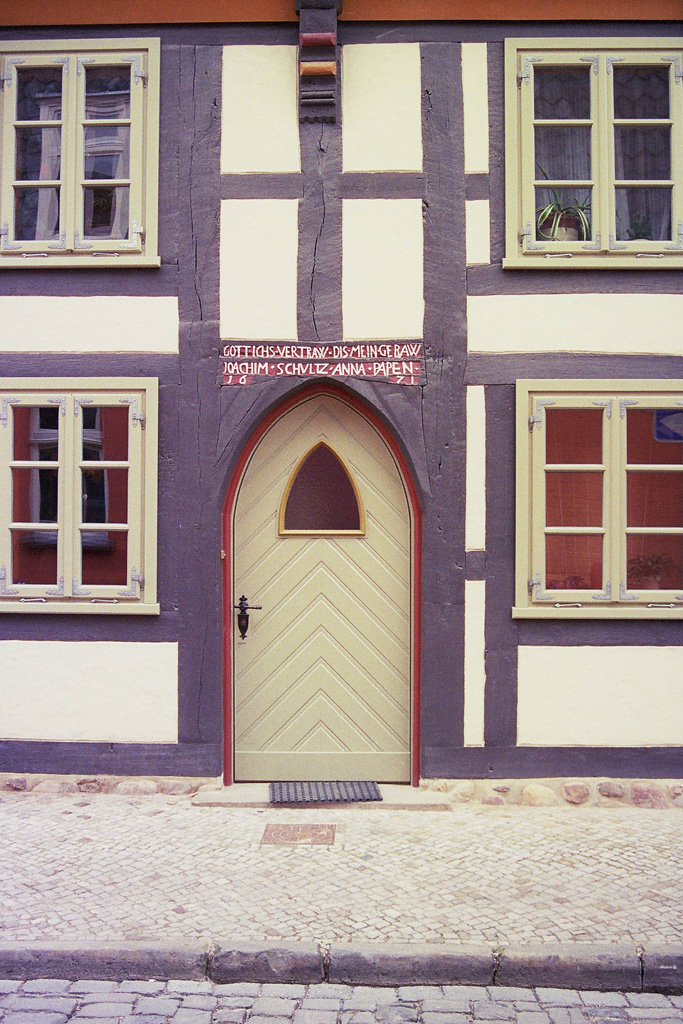 Salzwedel, Tür in einem Fachwerkhaus